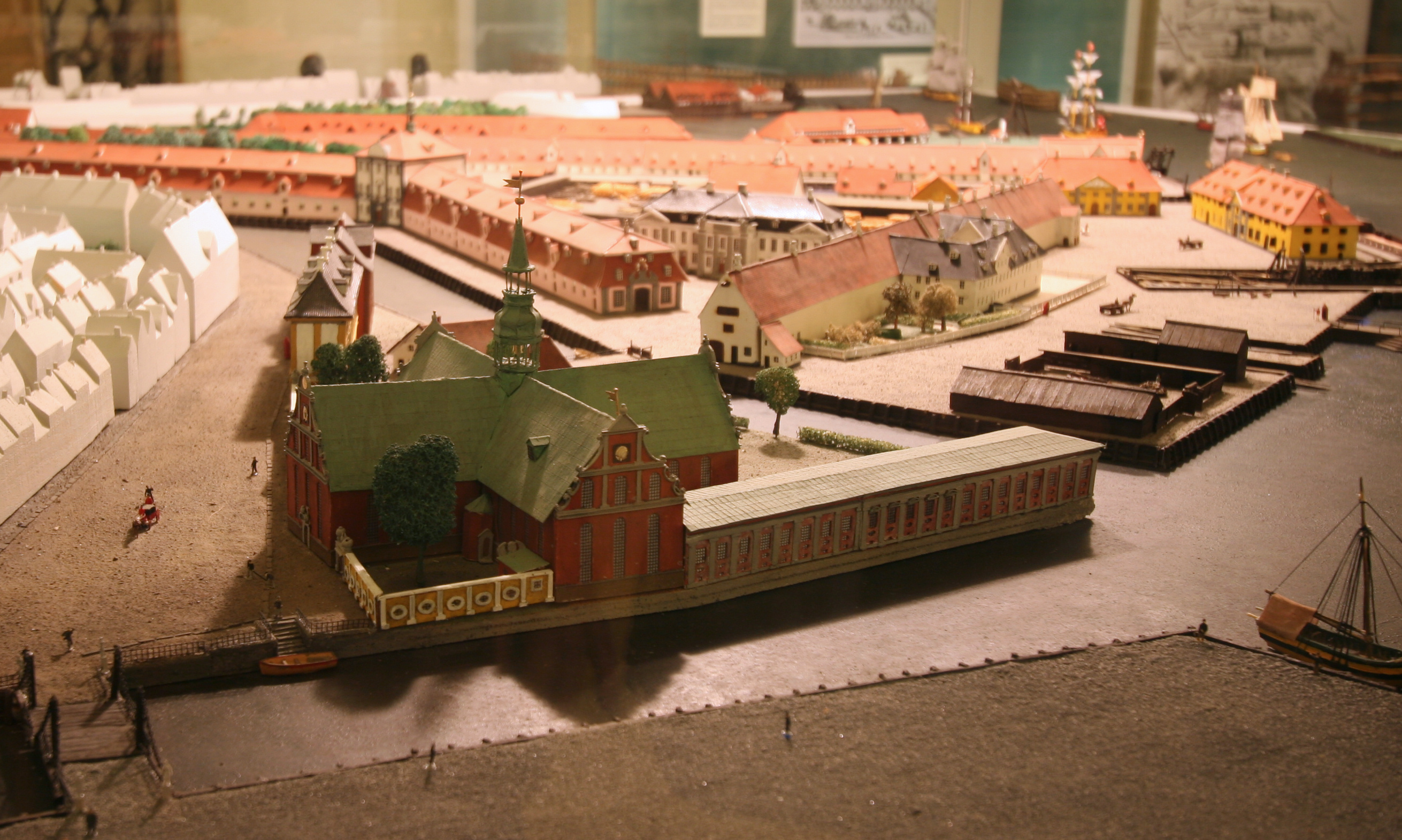 Holmens Kirke, Copenhagen, Denmark . Holmens Kirke i Orlogsmuseets model af Bremerholm.